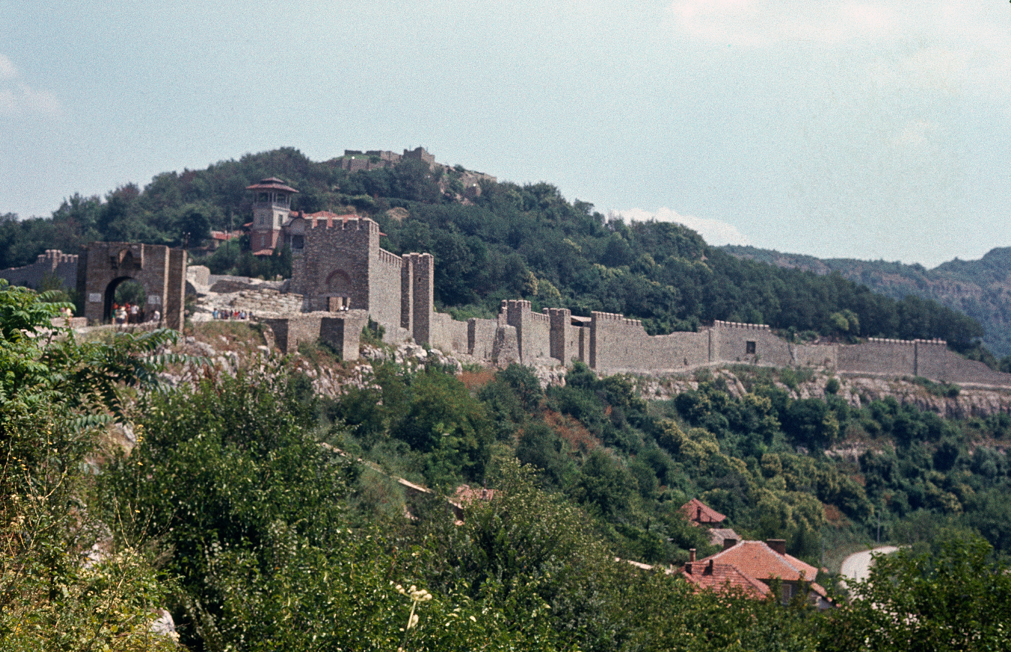 Bulgarien um 1970, Weliko Tarnowo